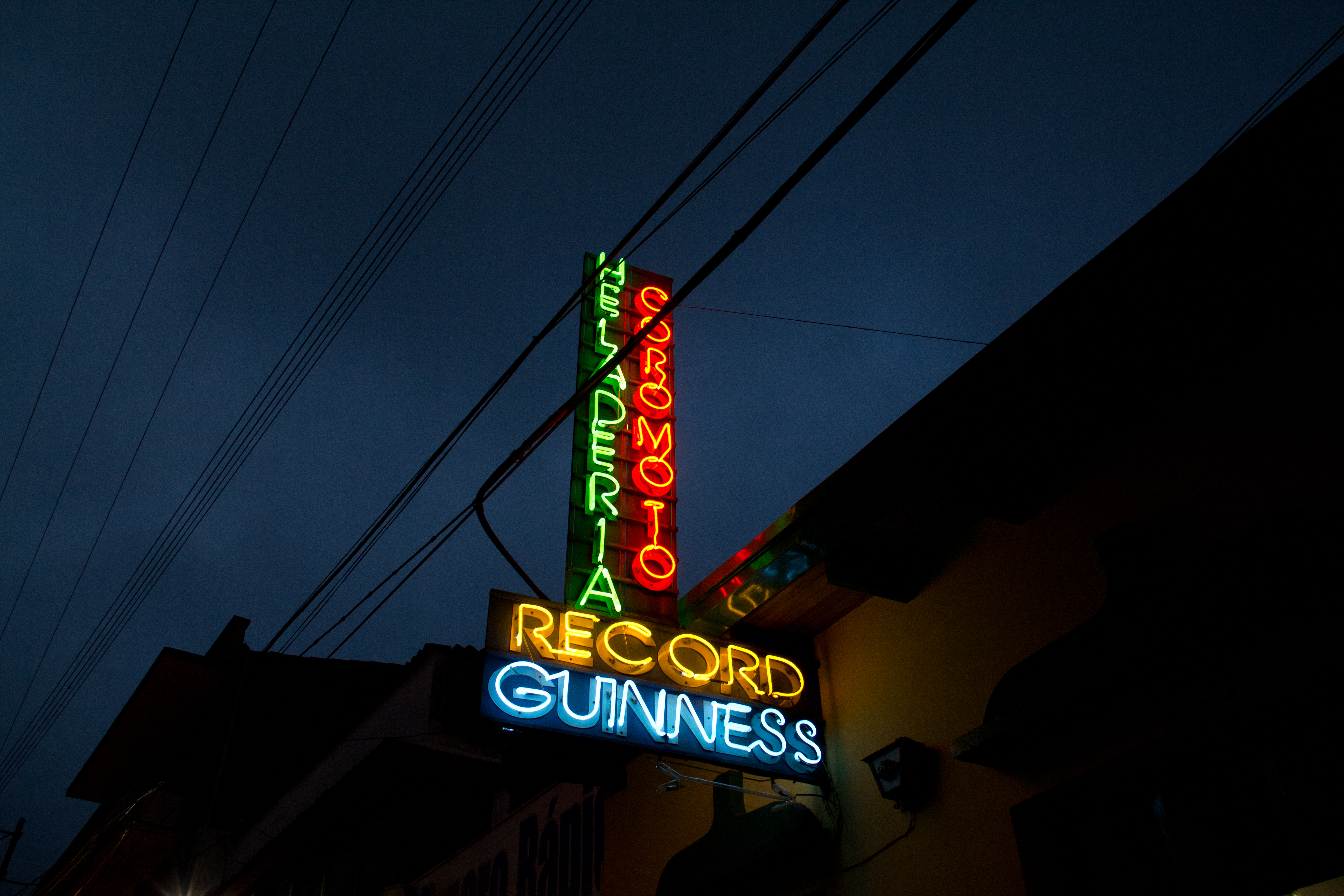 Famosa por ofrecer más de mil sabores de helados. Desde Caraotas hasta Blue Curaçao con Whisky, es un sitio que deben visitar si están de paseo por Mérida.